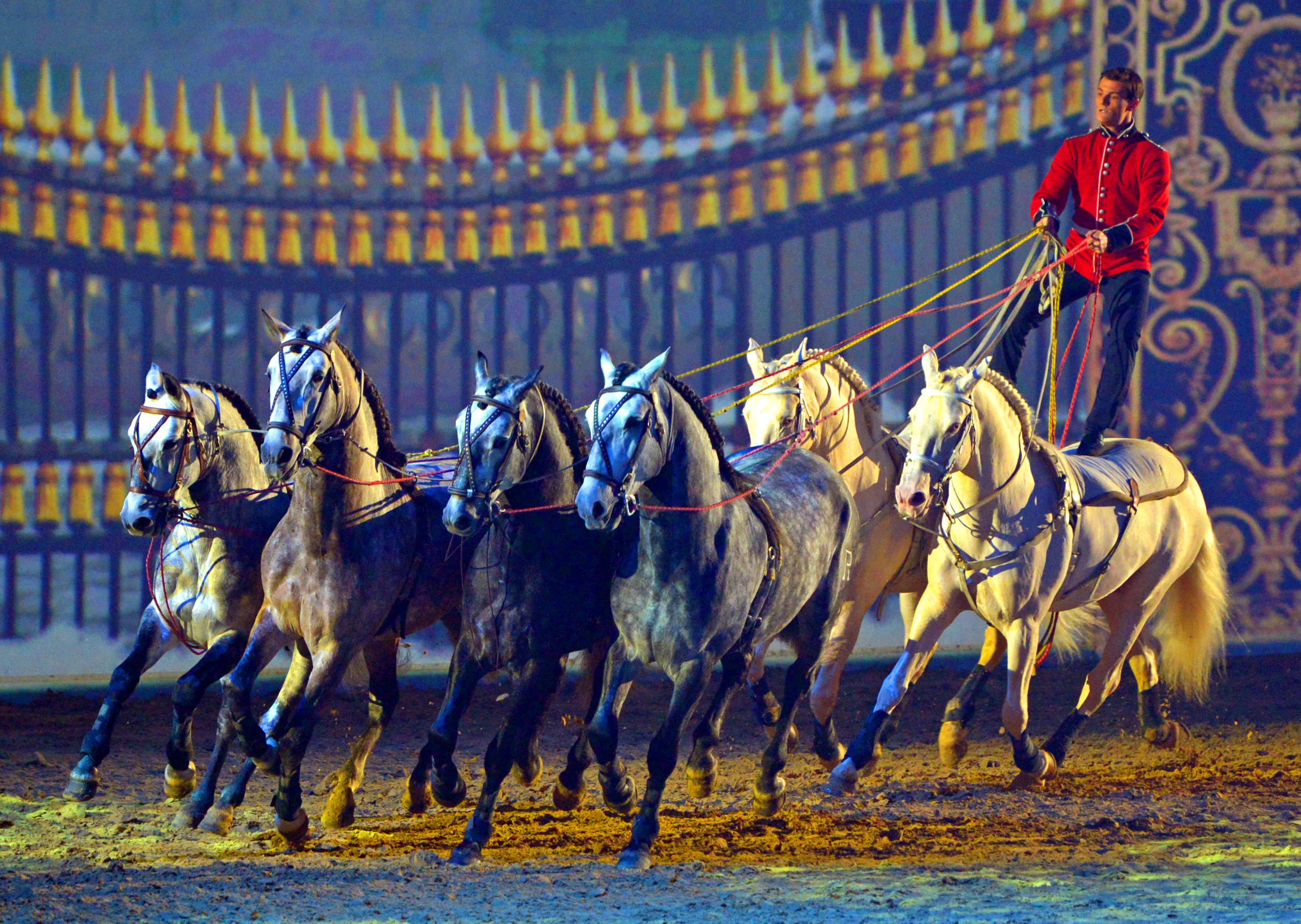 Ungarische Post mit Laury Tisseur (by APASSIONATA Academy)